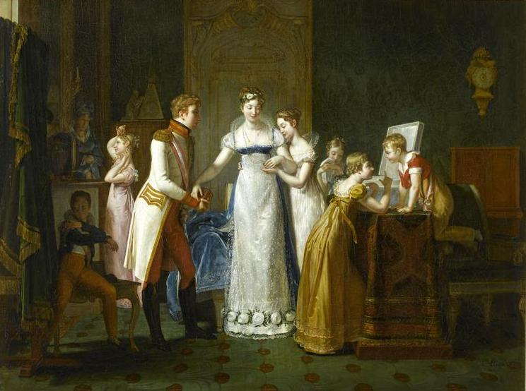 Adieux de Marie-Louise à sa famille le 13 mars 1810 (Marie-Louise distribuant les diamants de sa mère entre ses frères et soeurs, dans sa chambre à coucher à Vienne)